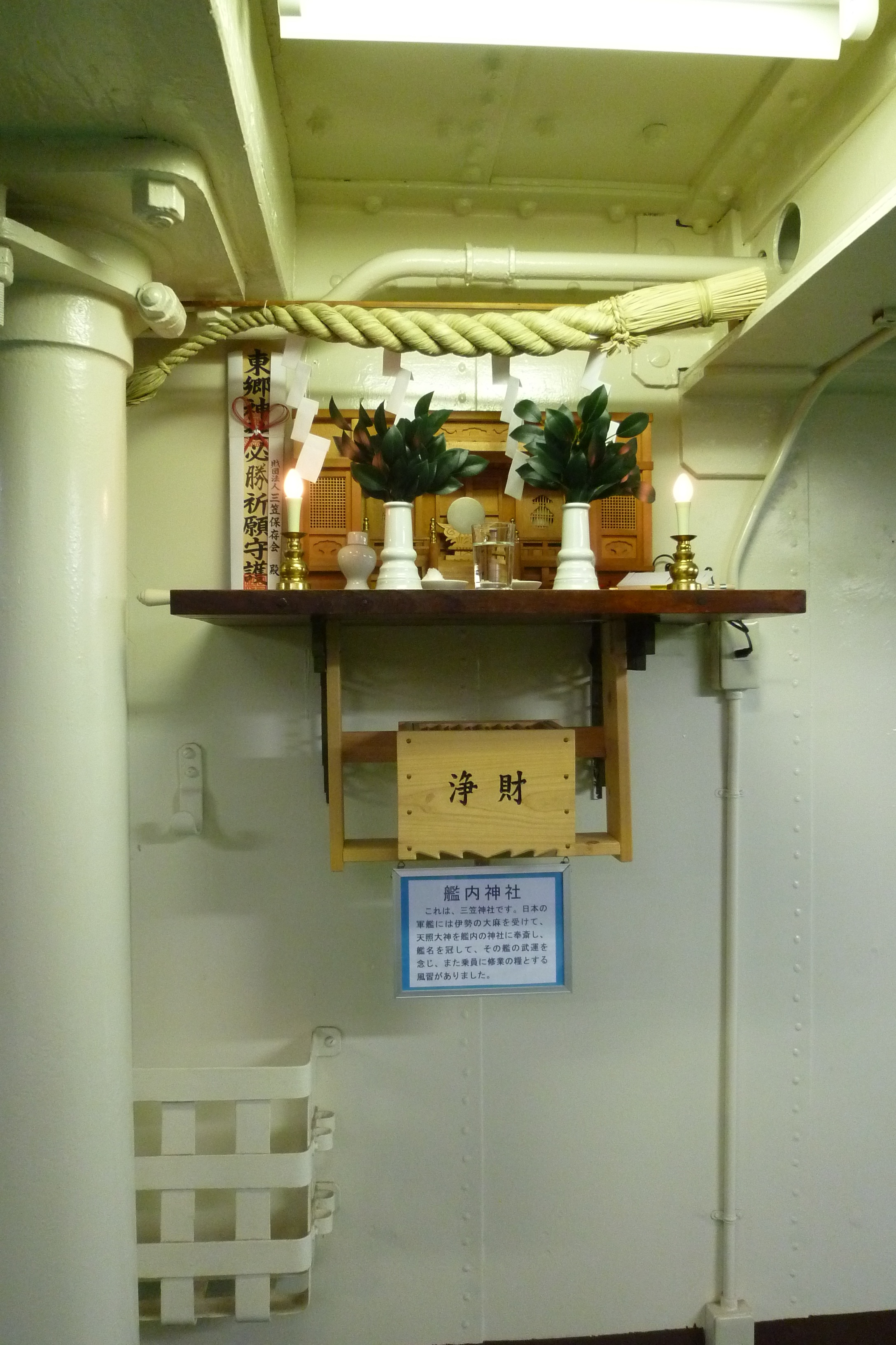 三笠の艦内神社 (Shrine inside battleship Mikasa)